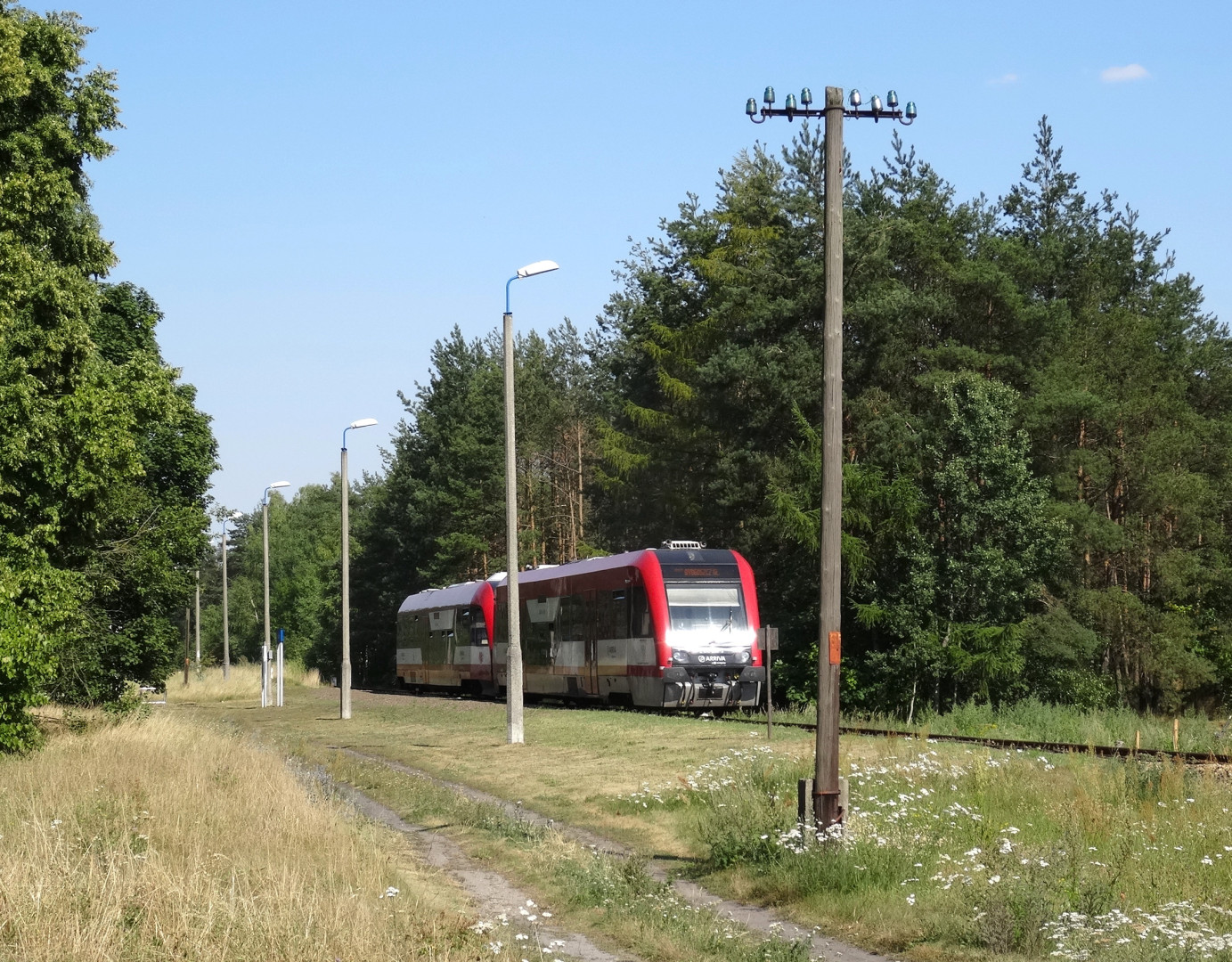 Gzin przystanek kolejowy, gmina Dąbrowa Chełmińska, linia kolejowa nr 209 Bydgoszcz-Chełmża